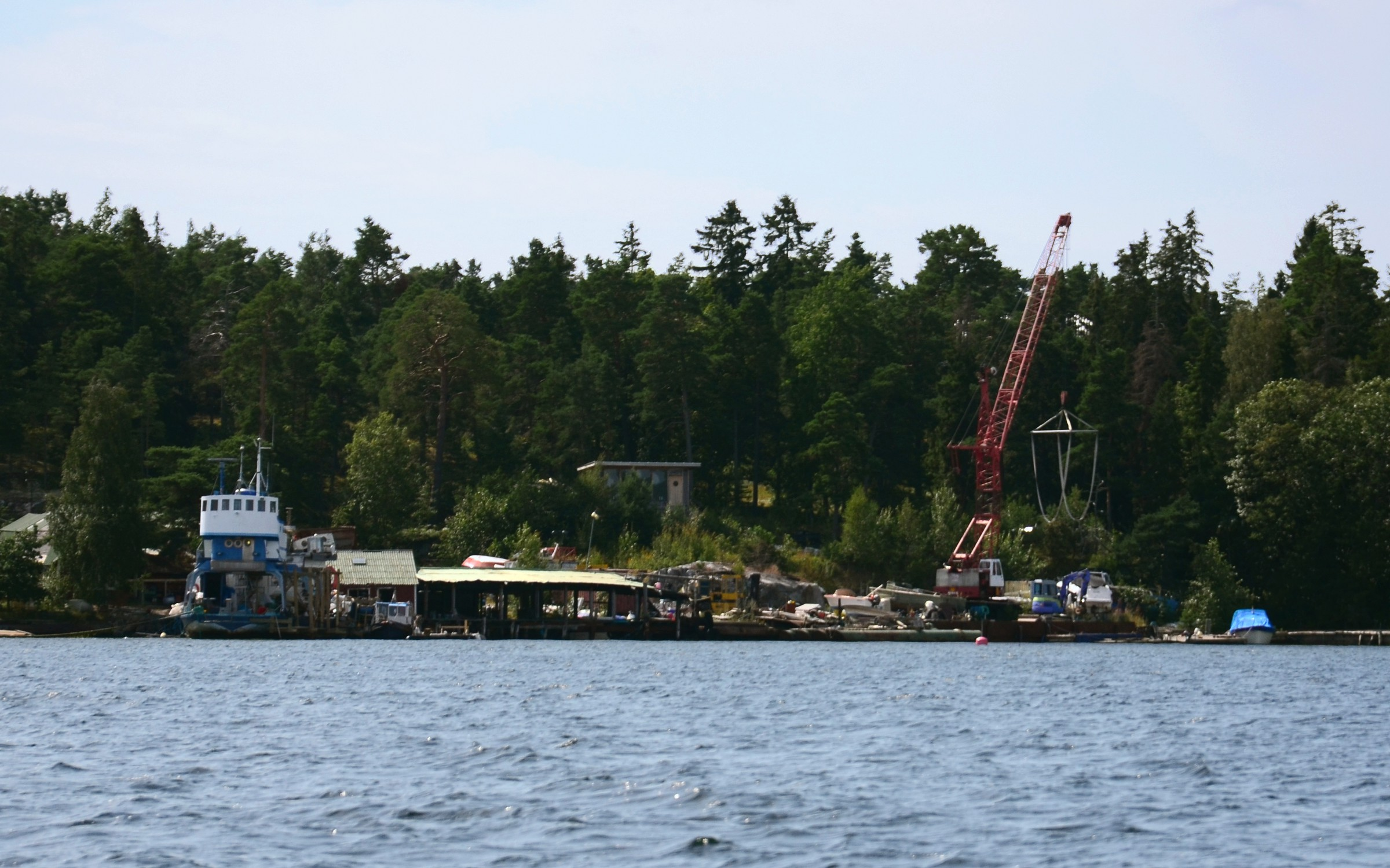 Gåsö varv på Gåsö i Stockholms skärgård.